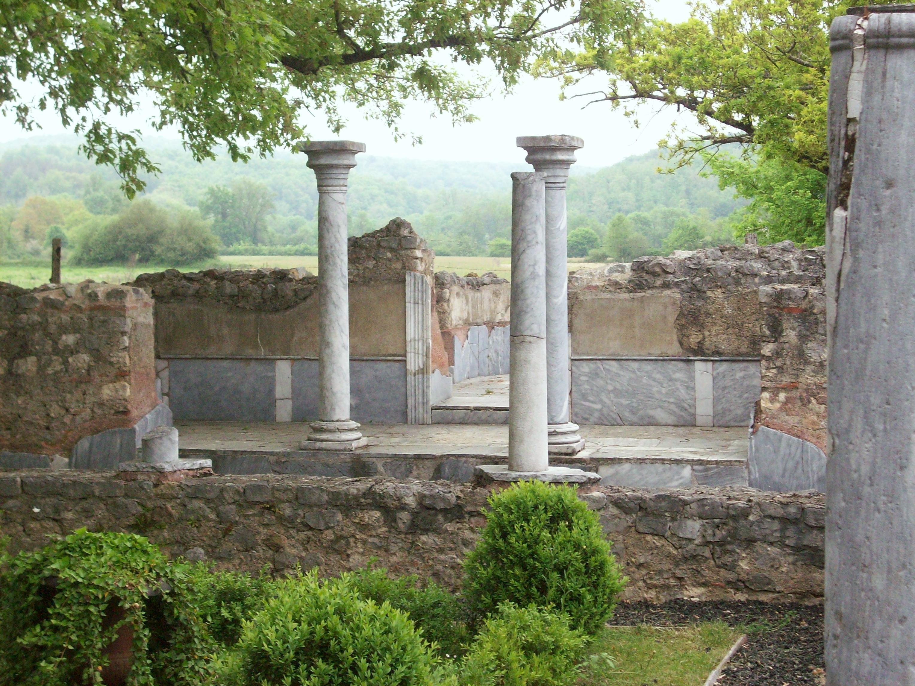 Aile thermale (Villa gallo-romaine de Montmaurin)